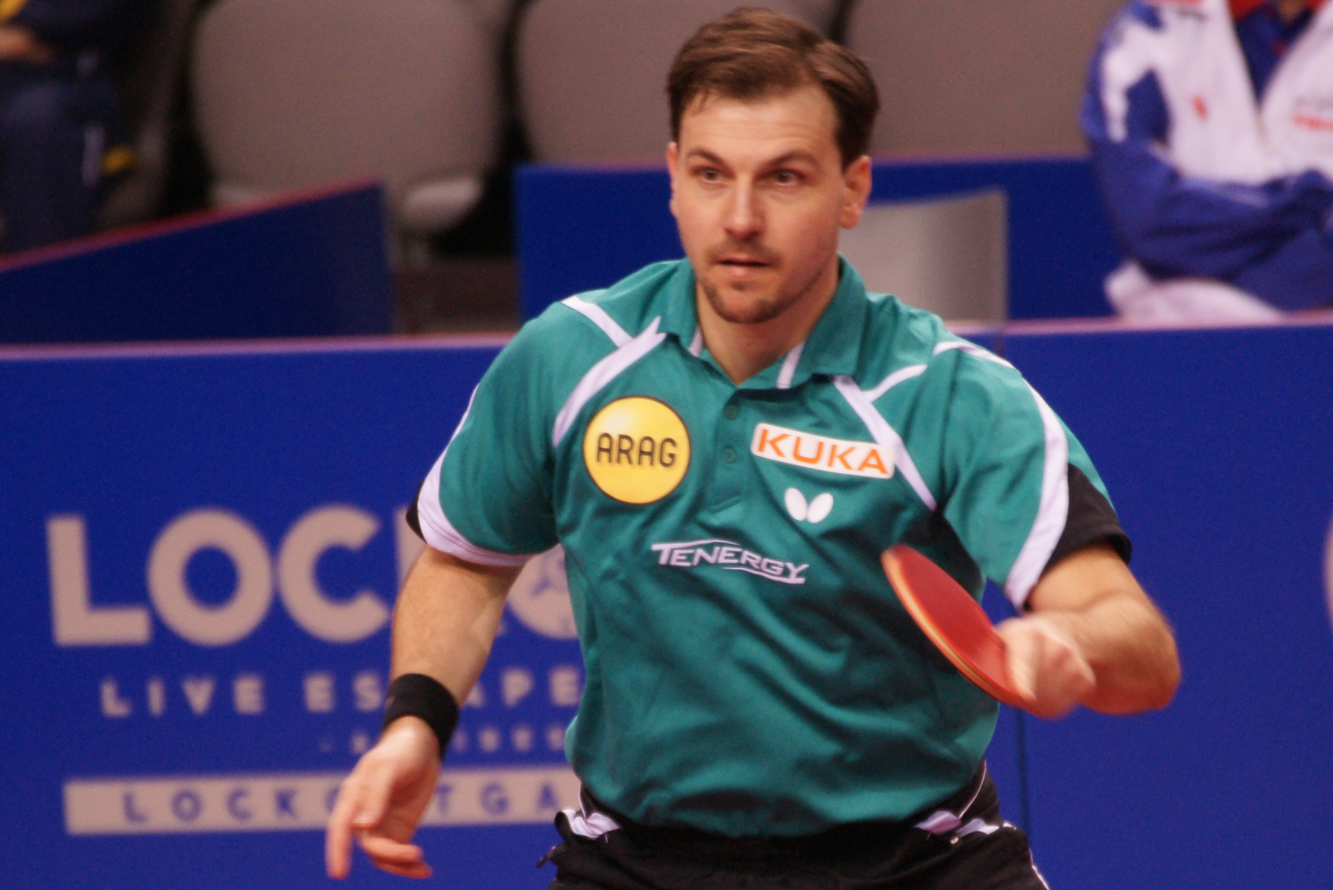 Timo Boll, Top 16 Antibes 2017